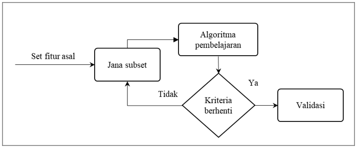 Proses pemilihan fitur kaedah pembalut